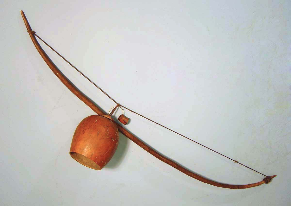 Muziekboog is een soort muziekinstrument waarbij een opgespannen snaar aangeslagen wordt. (Zelfgenomen) foto representeert instrument uit de collectie van het KMMA